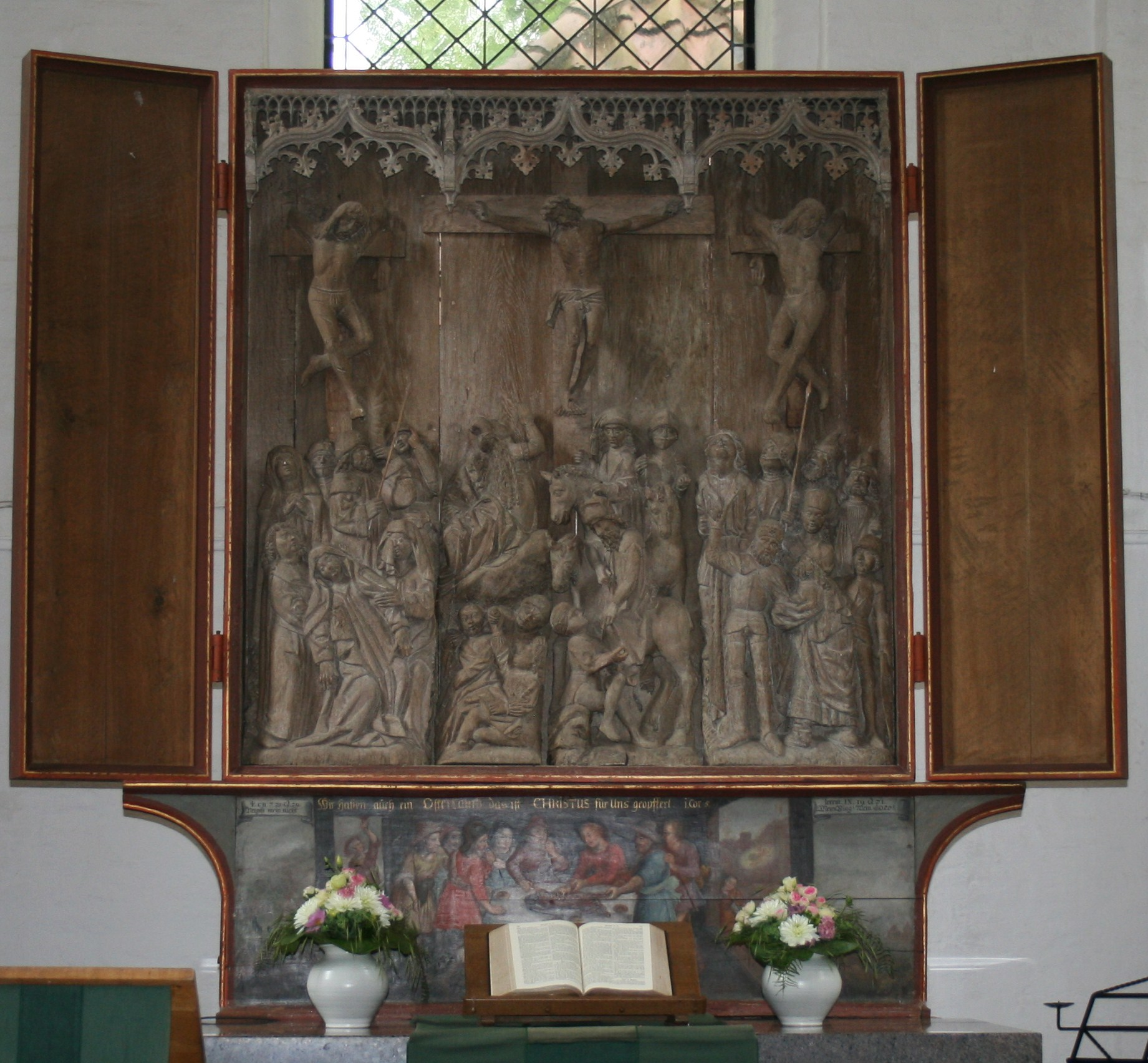 Altar der Catharinenkirche Westensee (Schleswig-Holstein)